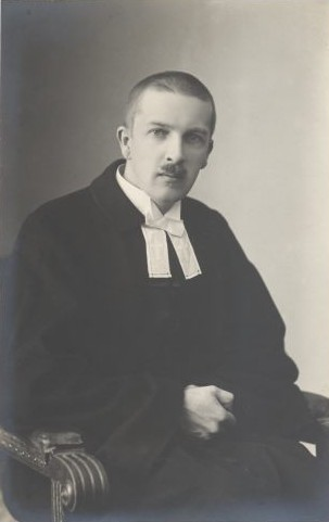 Werner Gruehn, baltisaksa teoloog